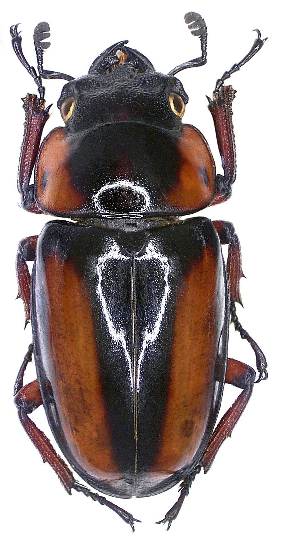 Familie: Lucanidae Groesse: 36-63 mm Verbreitung: Zentral- und Ostafrika Fundort: Kenia, Rondo, Kakamega-Regenwald, 1650 m leg. U.Eitschberger, 1997; det. U.Schmidt Photo: U.Schmidt, 2007